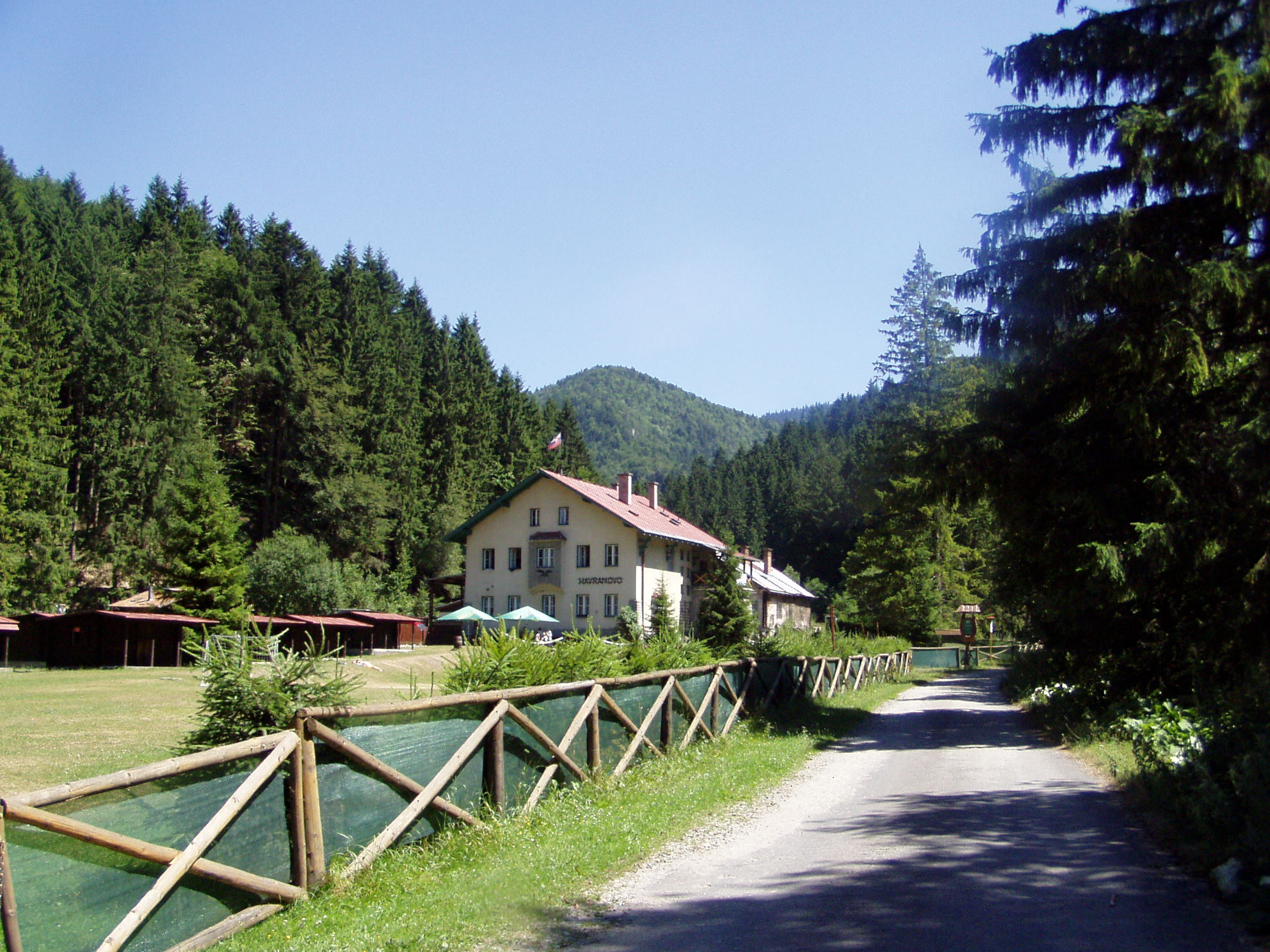 Rekreačné stredisko Havranovo